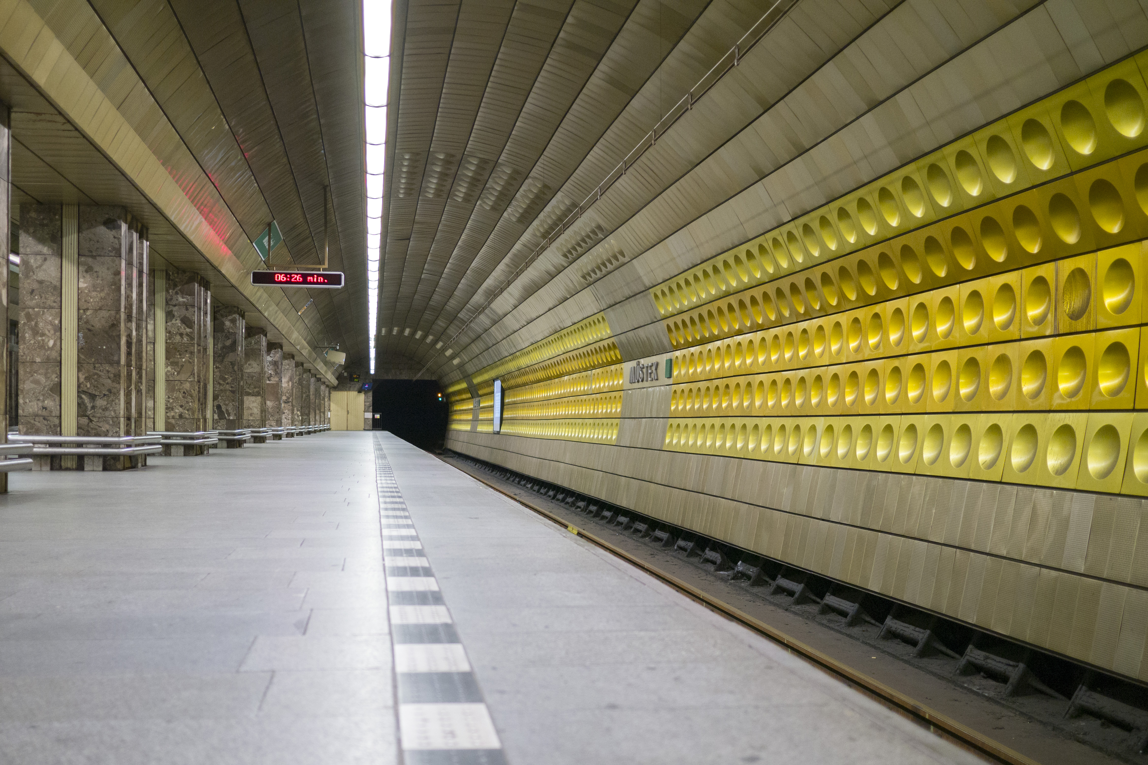 Prag Metro Mustek